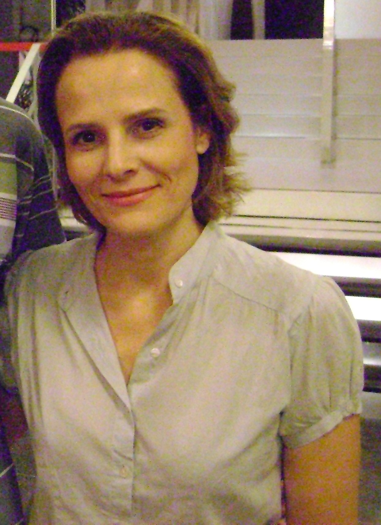 Bia Seidl, atriz brasileira, após a apresentação da peça "Cândida", em São Paulo.